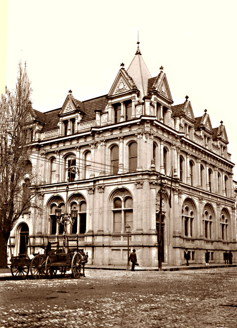 Antiga Caixa Econômica Federal em Porto Alegre